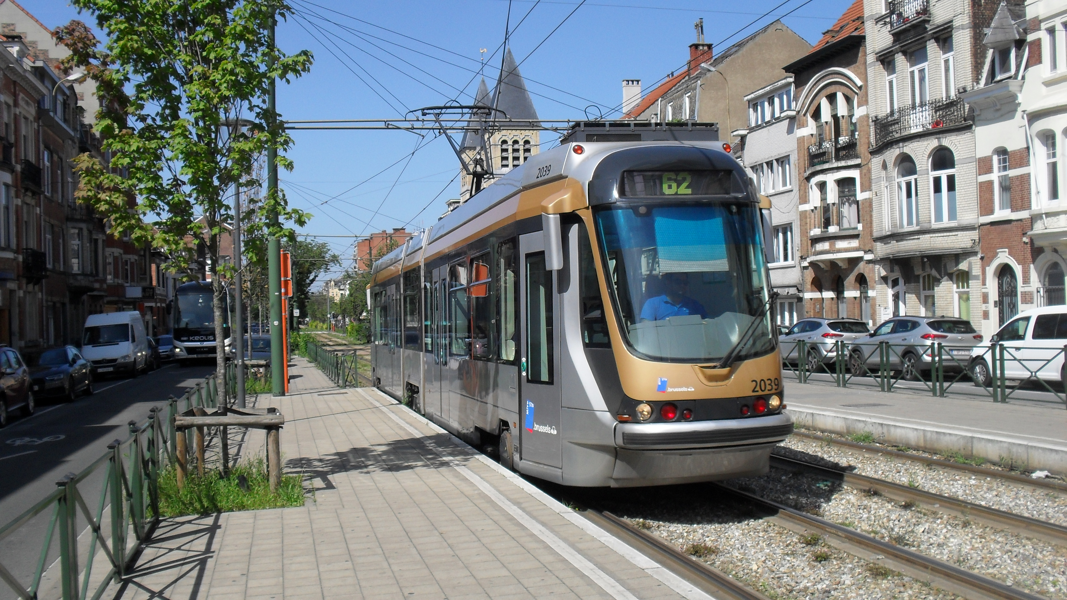 Tramway T2000 de la ligne 62 à Meiser